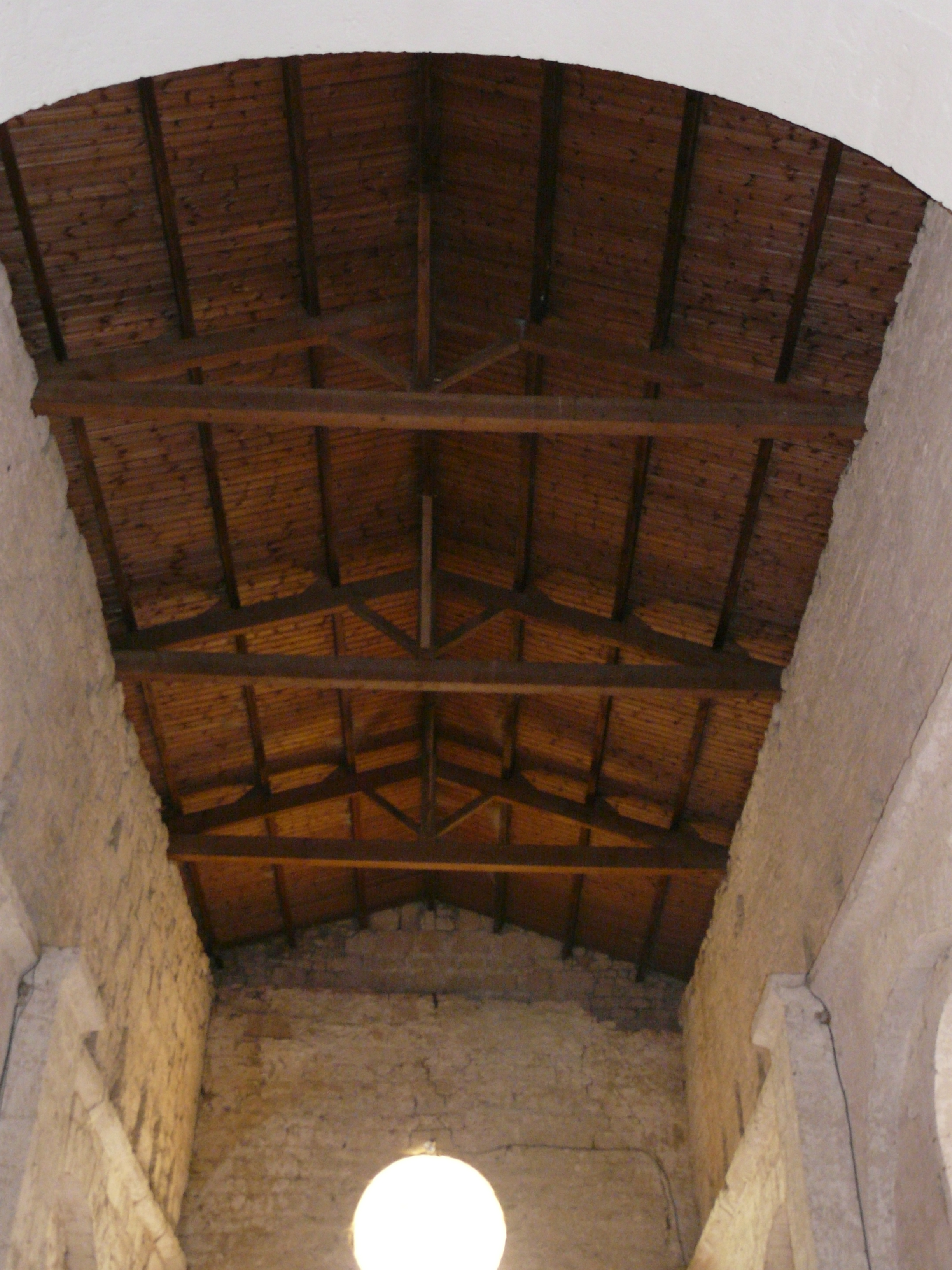 Le plafond de la nef de l'église Saint-Christophe de Vindelle, Charente, France.